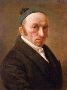 Self-portrait